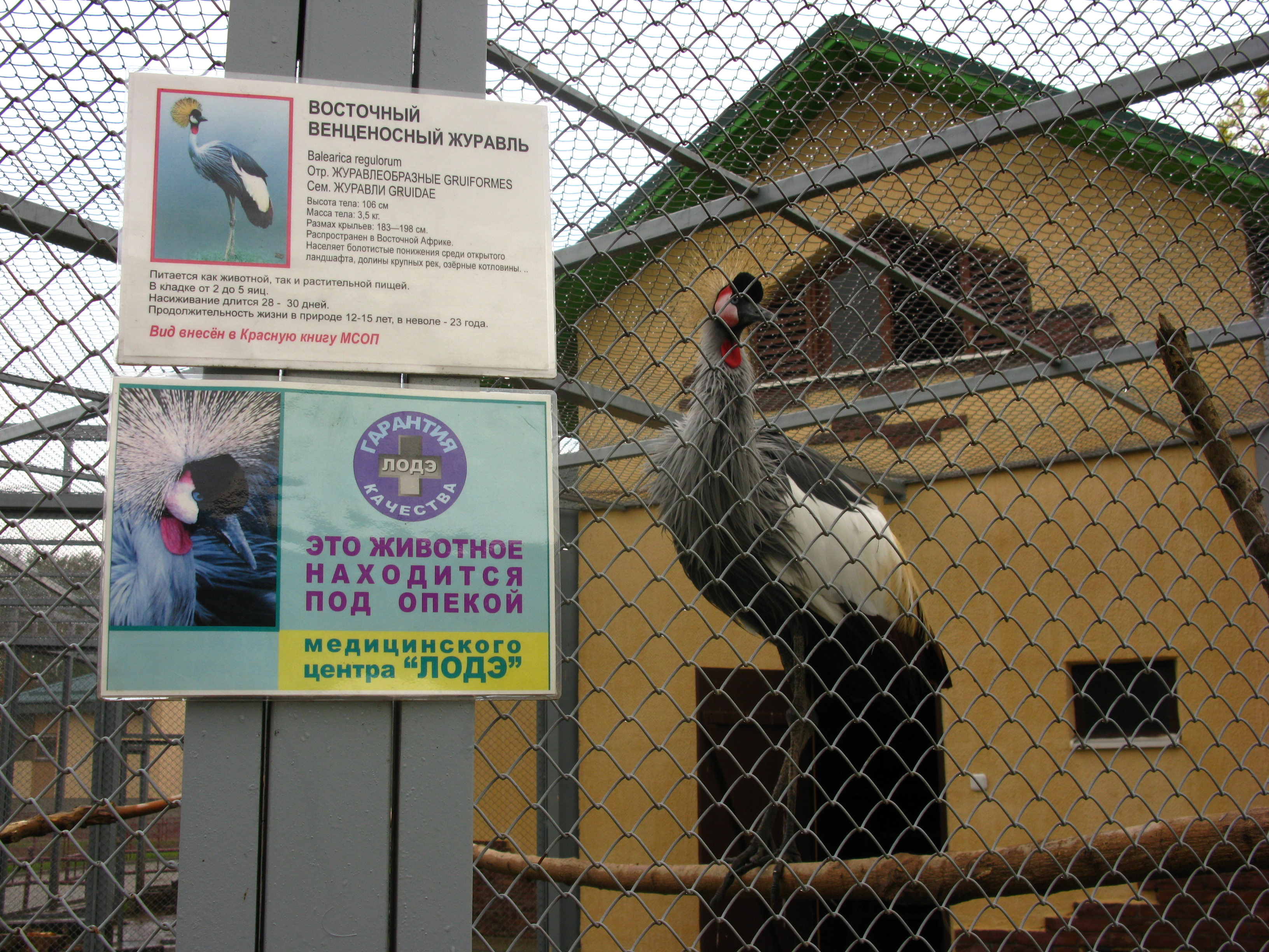 Восточный венценосный журавль (Balearica regulorum), находящийся под опекой медицинского центра "ЛОДЭ" в зоопарке города Гродно, Беларусь.